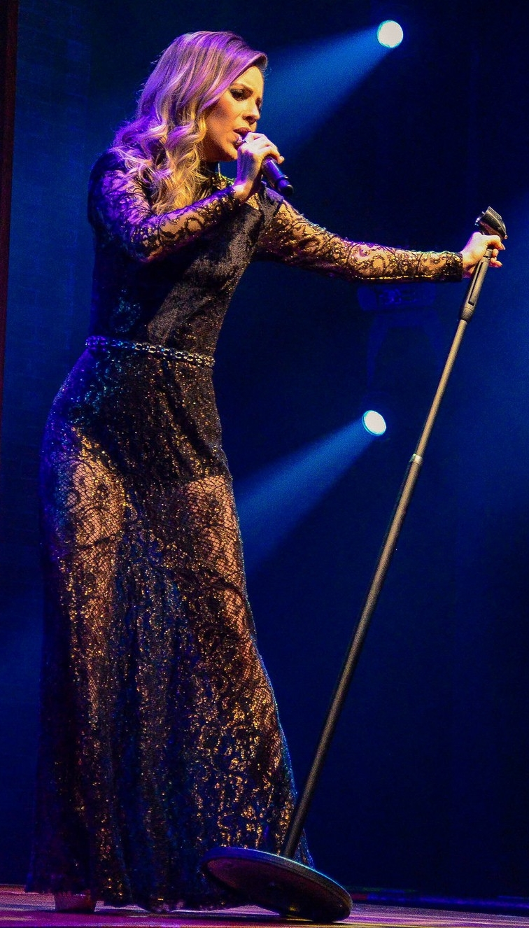 Sandy se apresentando com a turnê Meu Canto na casa de shows Tom Brasil, em São Paulo - 2 de junho de 2017.